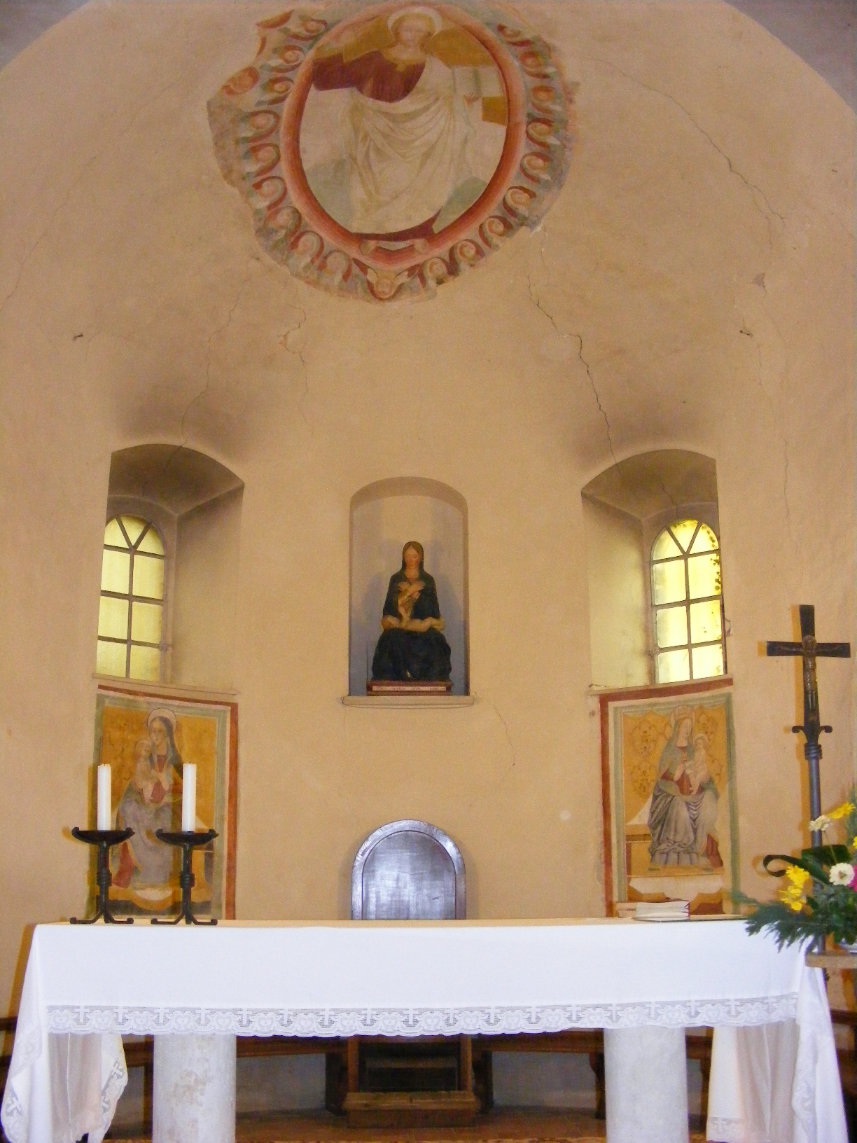 Abside della chiesa di Santa Maria di Legarano, comune di Casperia (Rieti)